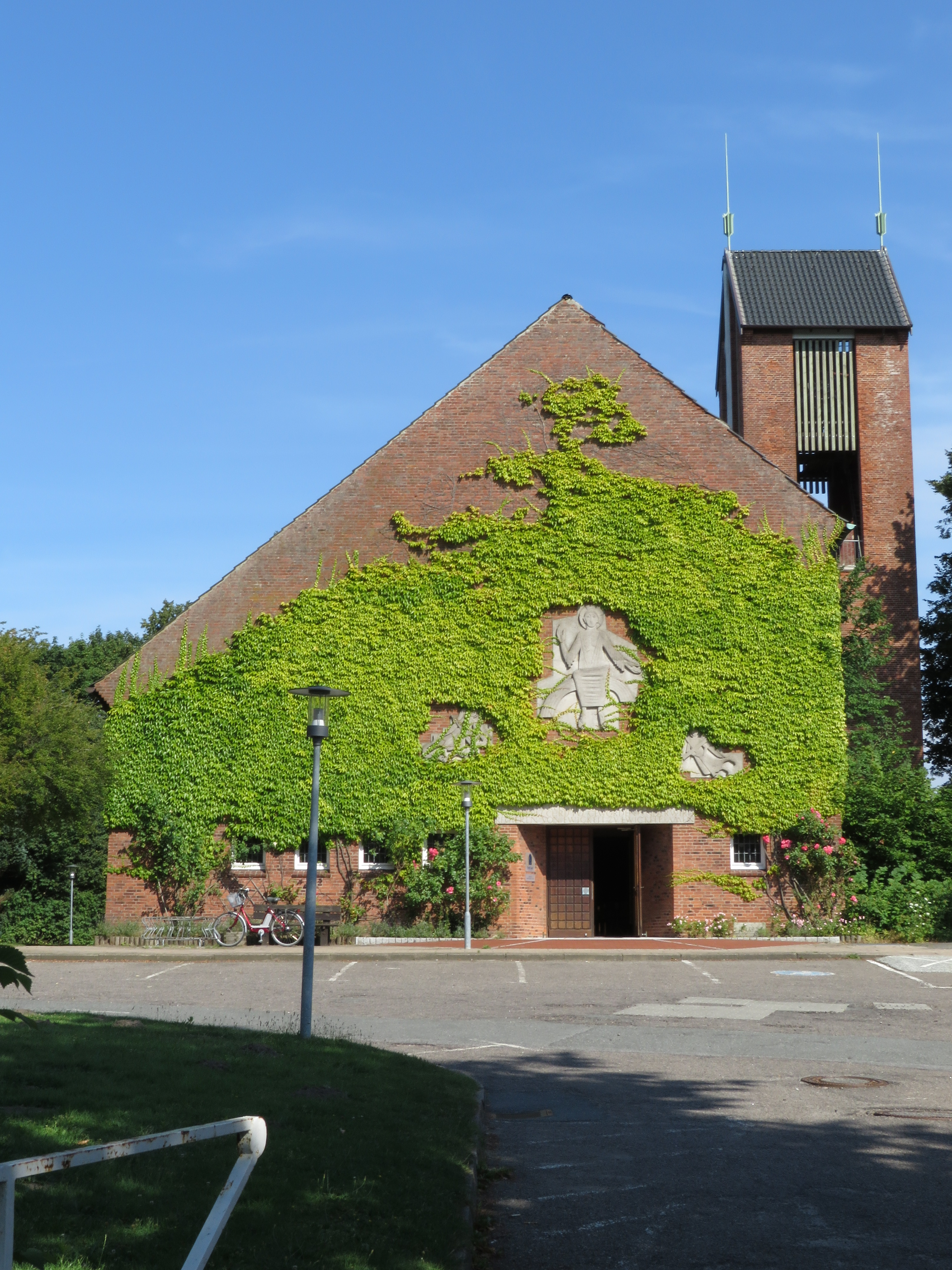 Christuskirche (Flensburg-Mürwik, Juli 2014), Bild 01